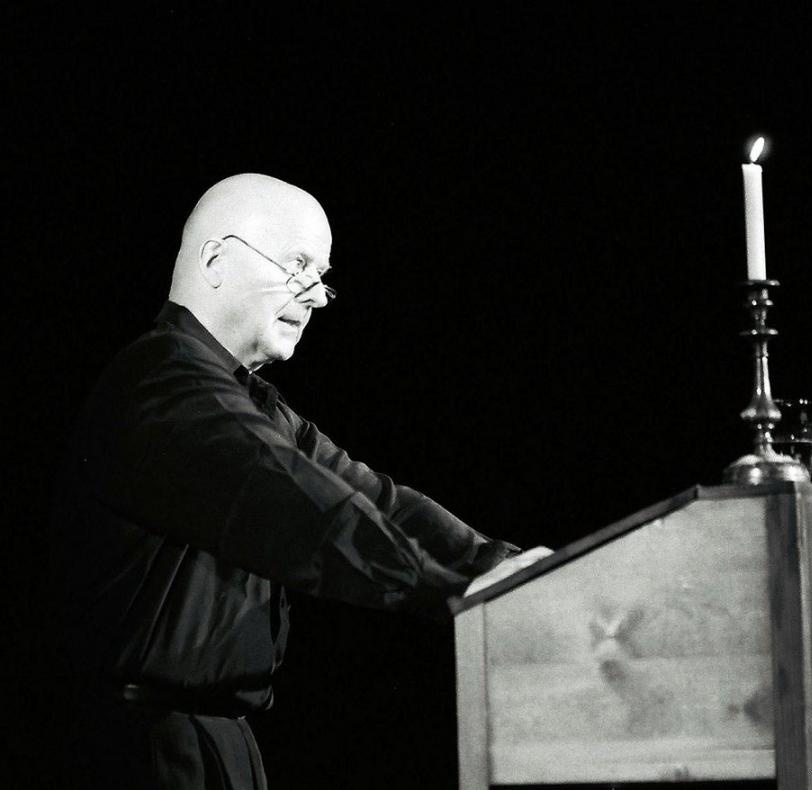 Friedrich-Wilhelm Junge in "Der Traum eines lächerlichen Menschen" auf dem Theaterkahn Dresden